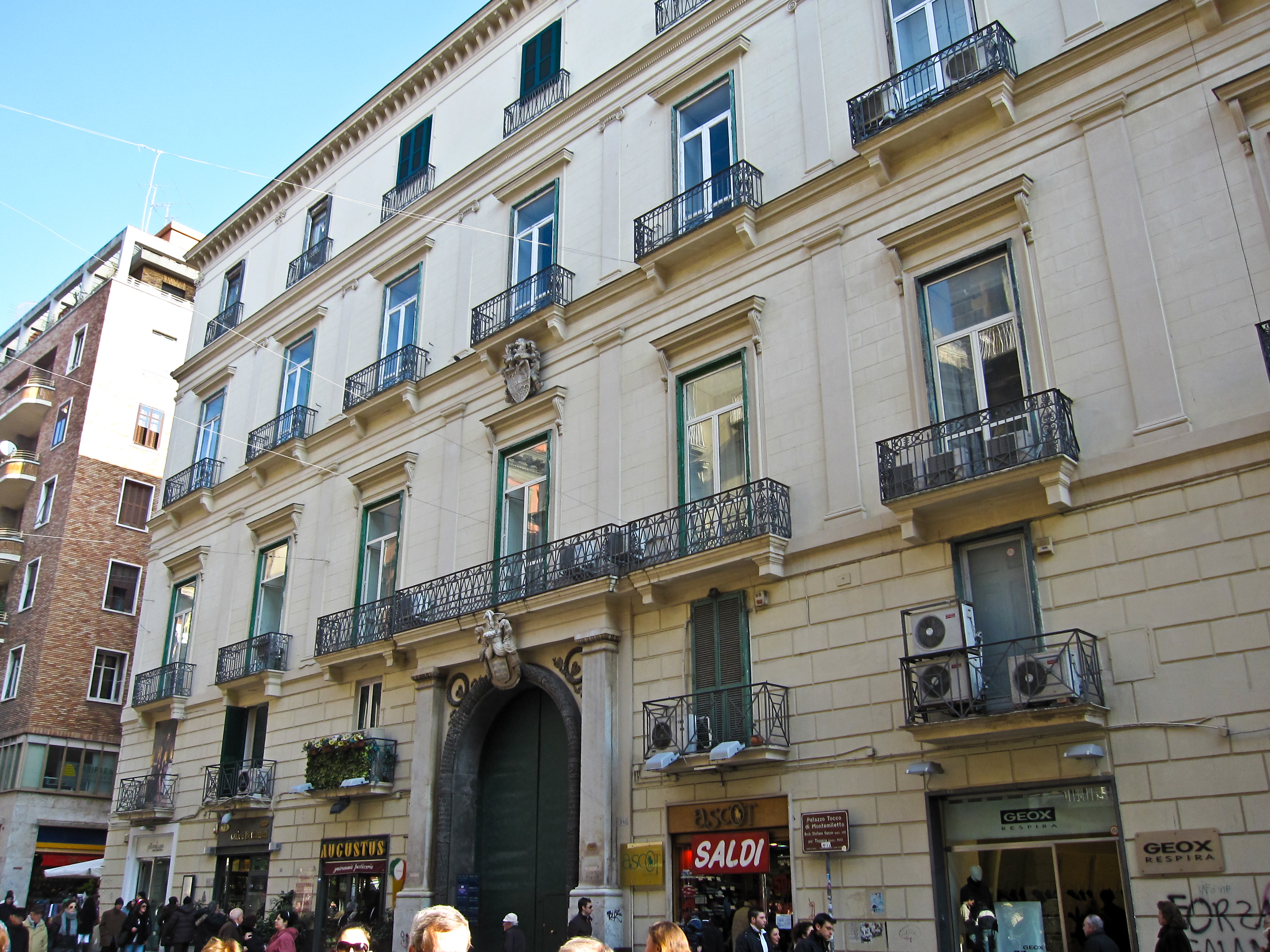 Napoli - Palazzo Tocco di Montemiletto. Facciata su Via Toledo